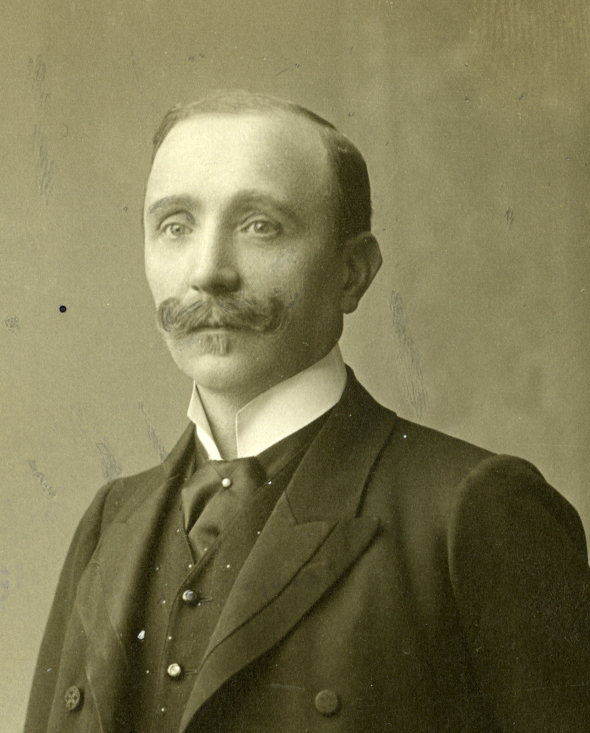 Der Gewerkschaftler und Politiker Franz Domes (1863-1930) auf einer von ihm signierten Karte mit dem Datum 6.VI.1911.